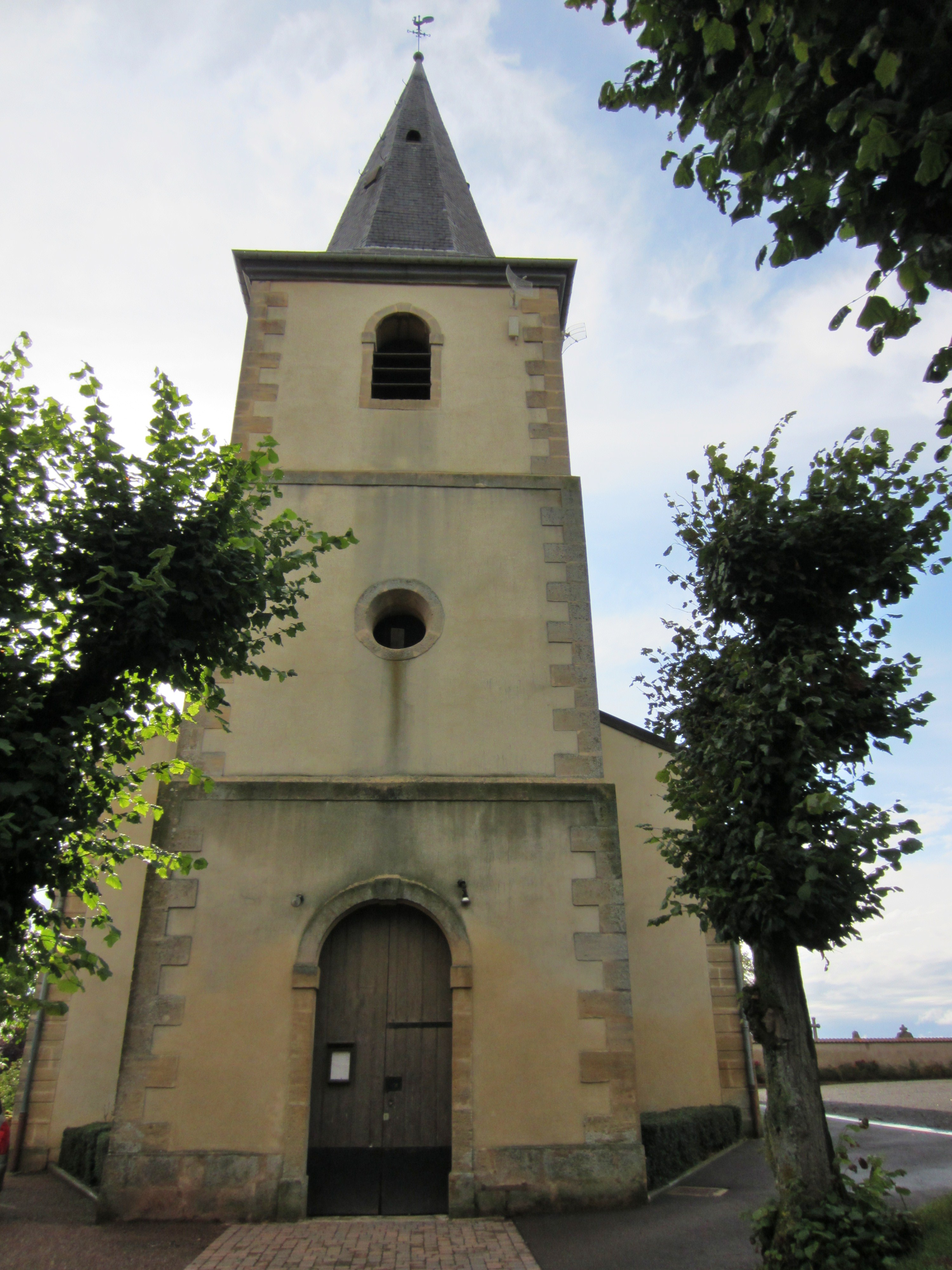 Description eglise Bruville eglise Bruville